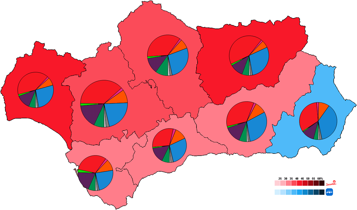 Resultados de elecciones en Andalucía 2015